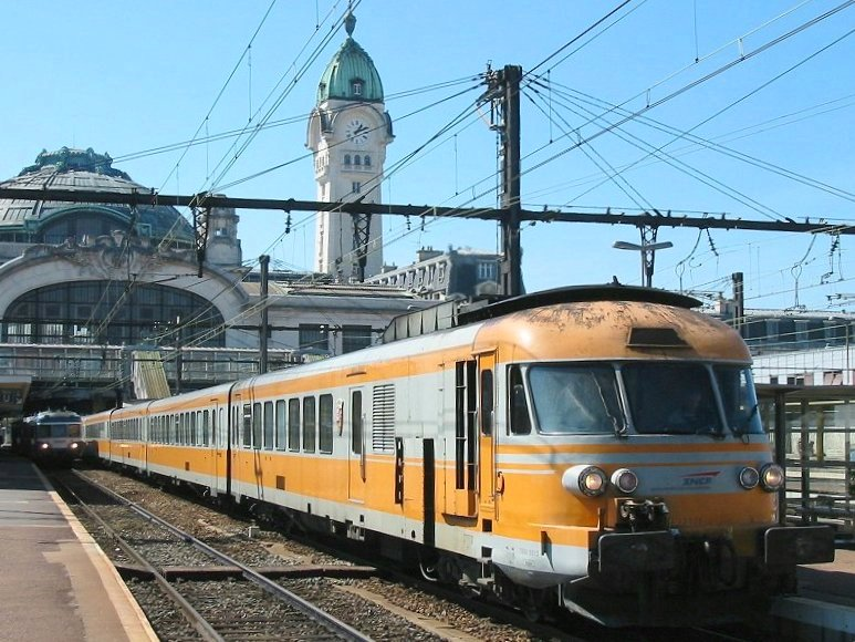 Rame Turbotrain effectuant la liaison Bordeaux Lyon à l'arrêt en gare de Limoges Bénédictins